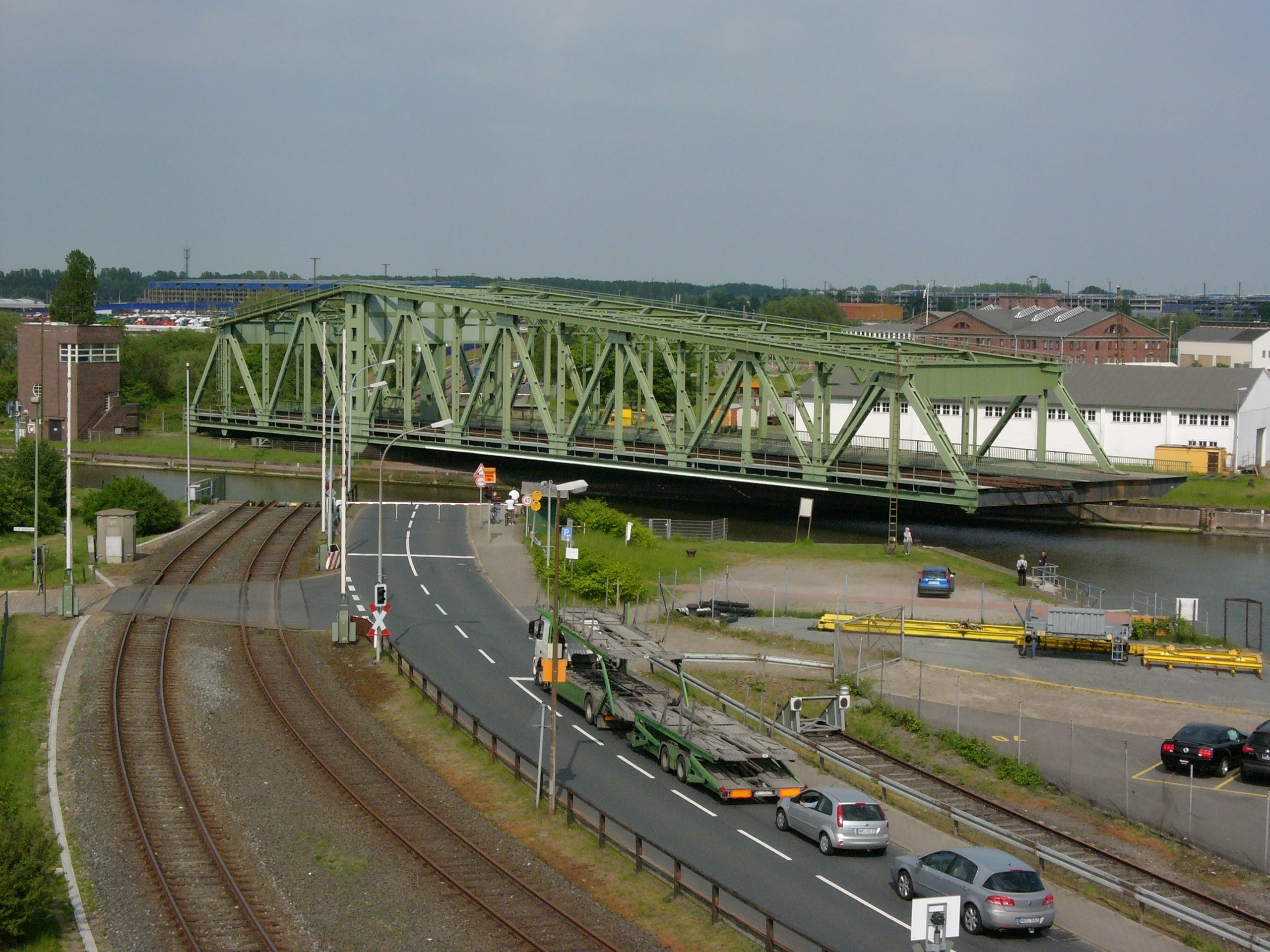 Nordschleusenbrücke (Bremerhaven, northern Germany) opening (3)